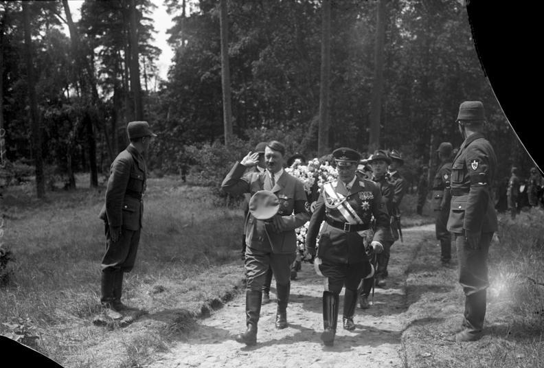 Adolf Hitler und Ministerpräsident Hermann Göring bei der Überführung der verstorbenen Frau Hermann Görings, Karin [Carin] Göring von Schweden in die Schorfheide am 19. Juni 1934.